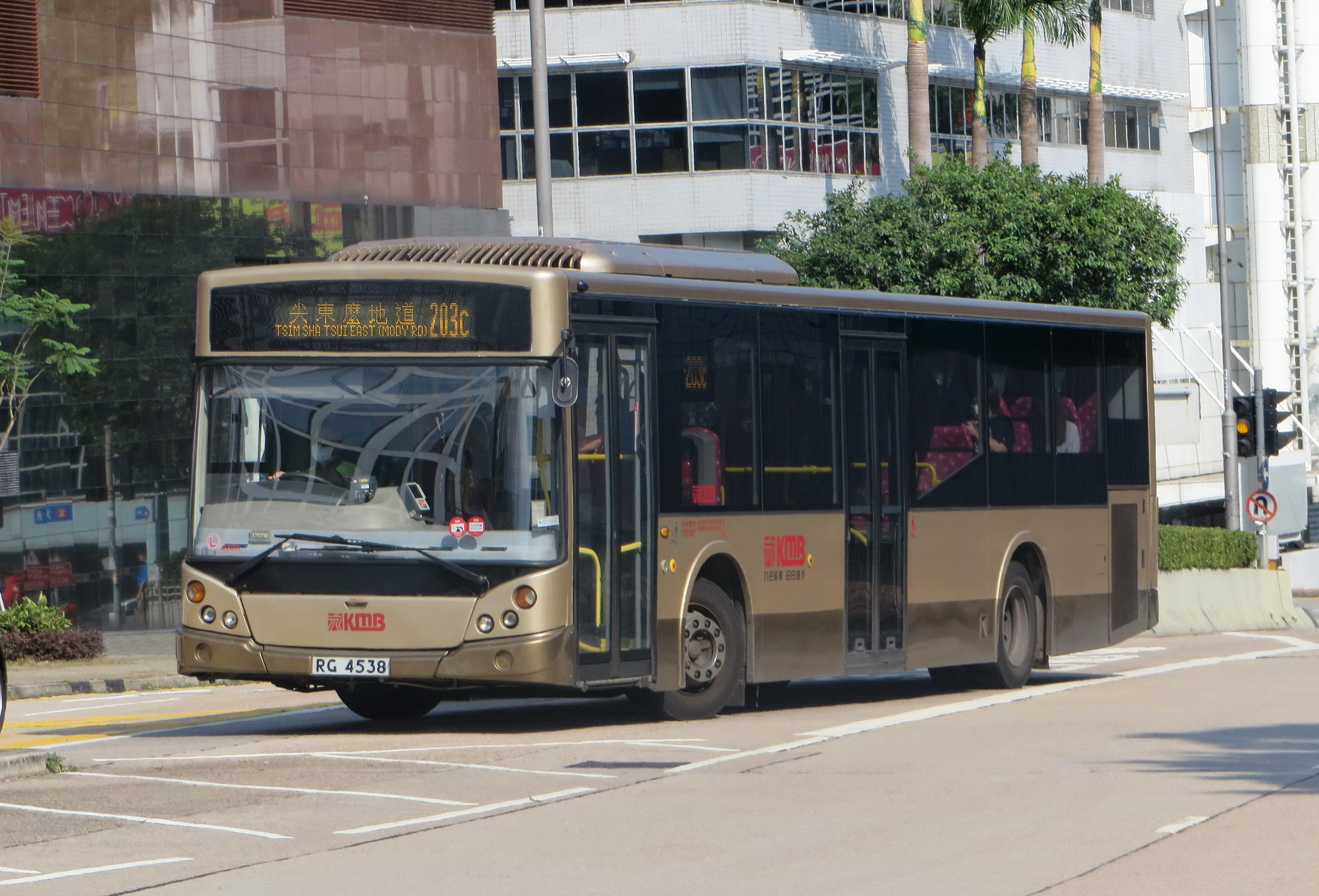 中文（中国大陆）: RG4538